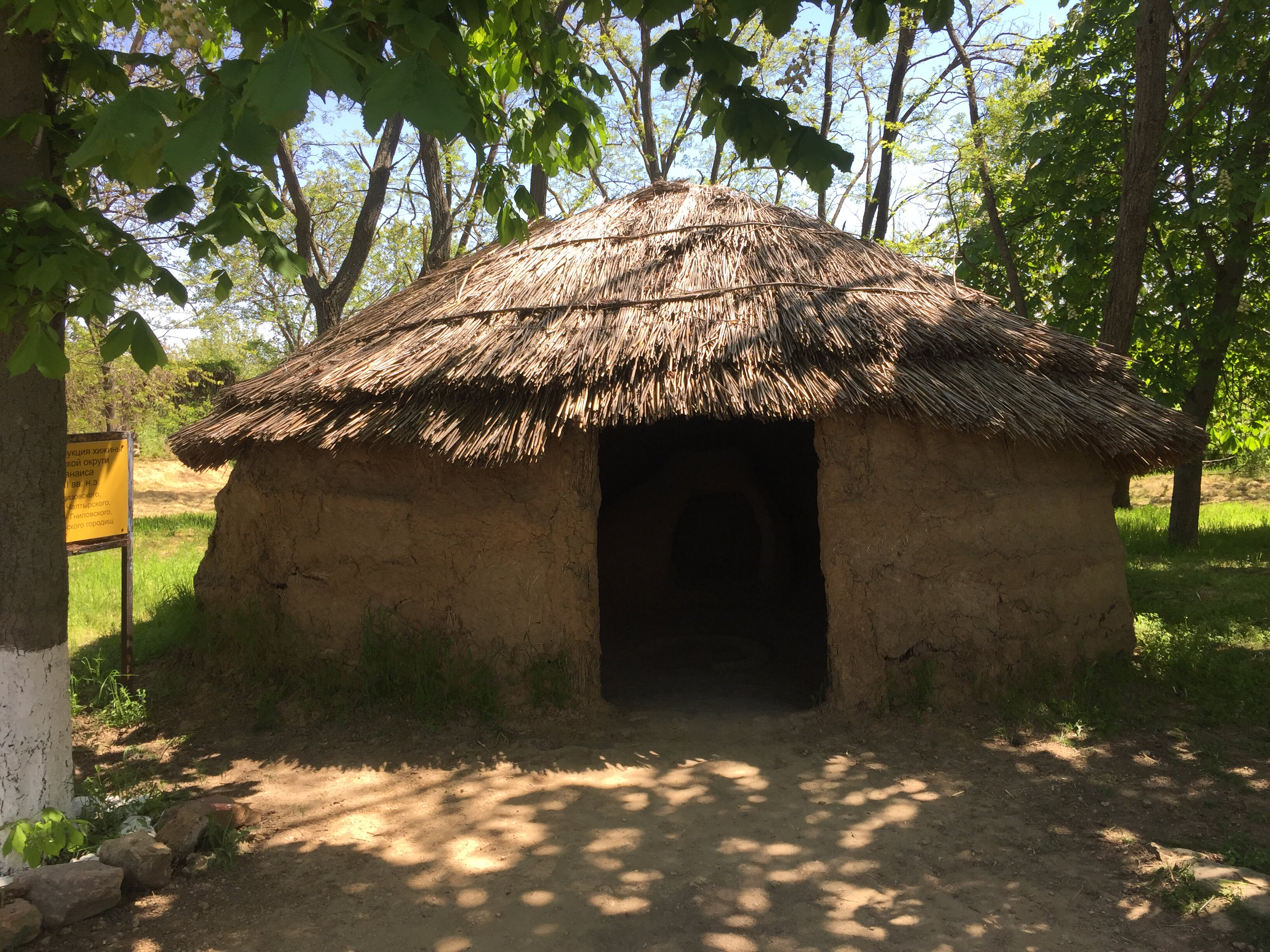 Танаис, археологический музей-заповедник: Недвиговка, Мясниковский район, Ростовская область This image is related to the protected area of Russia number 6100081